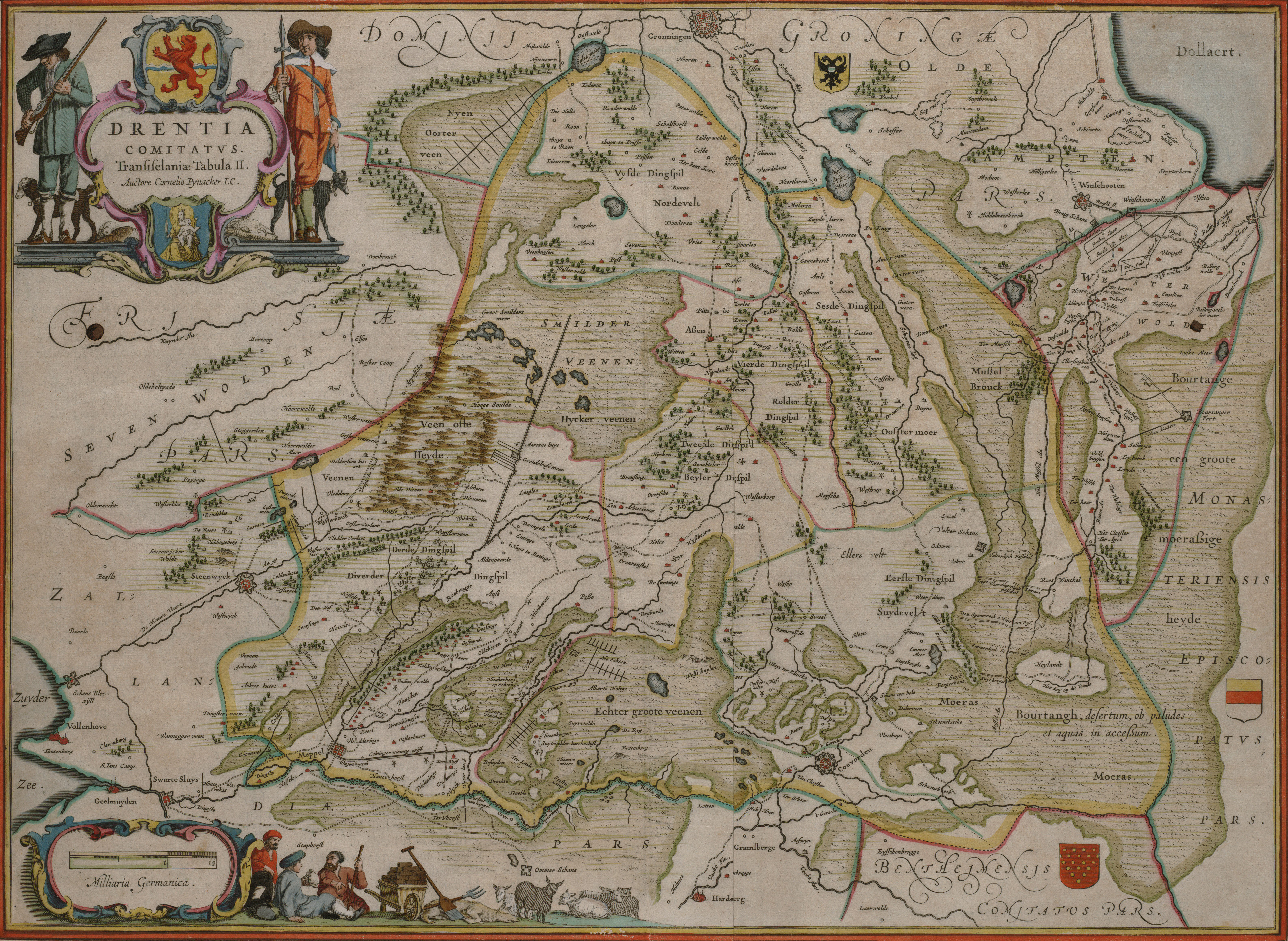 Oude kaart van Drenthe uit 1634